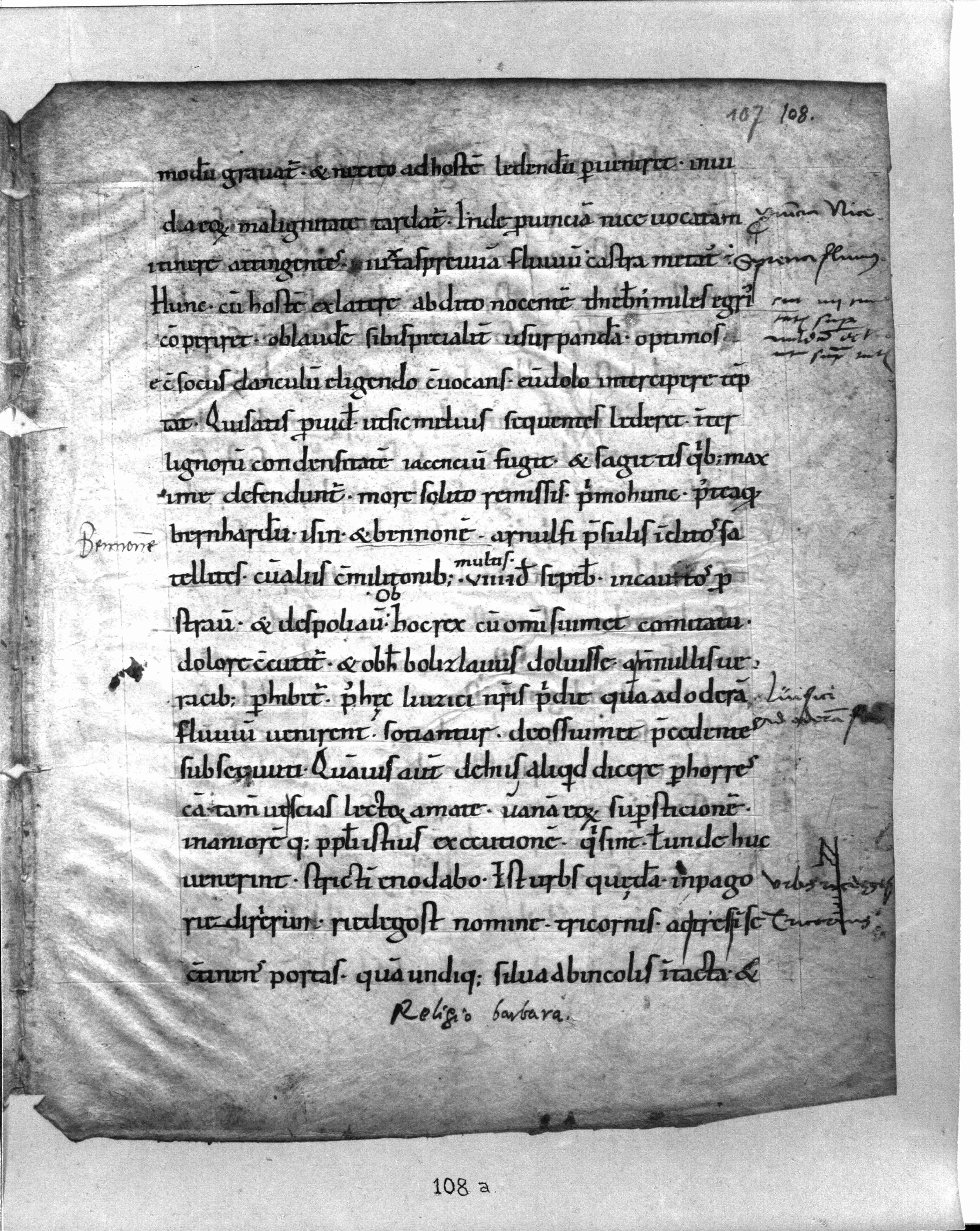 Thietmar von Merseburg, Chronicon (VI. 23.) S. 108a